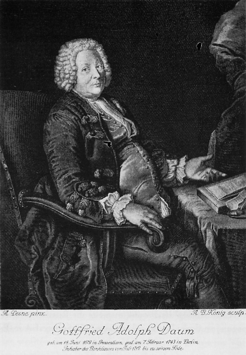 Gottfried Adolph Daum (1679-1743)